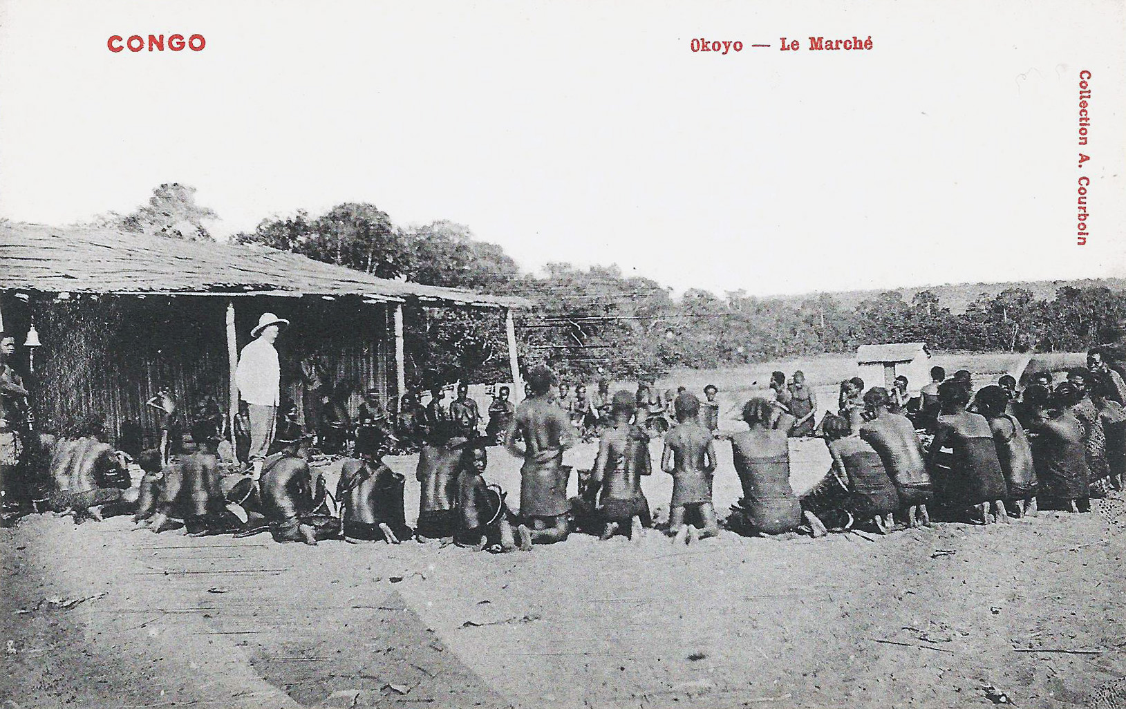 Okoyo. Le Marché. Collection A. Courboin Congo